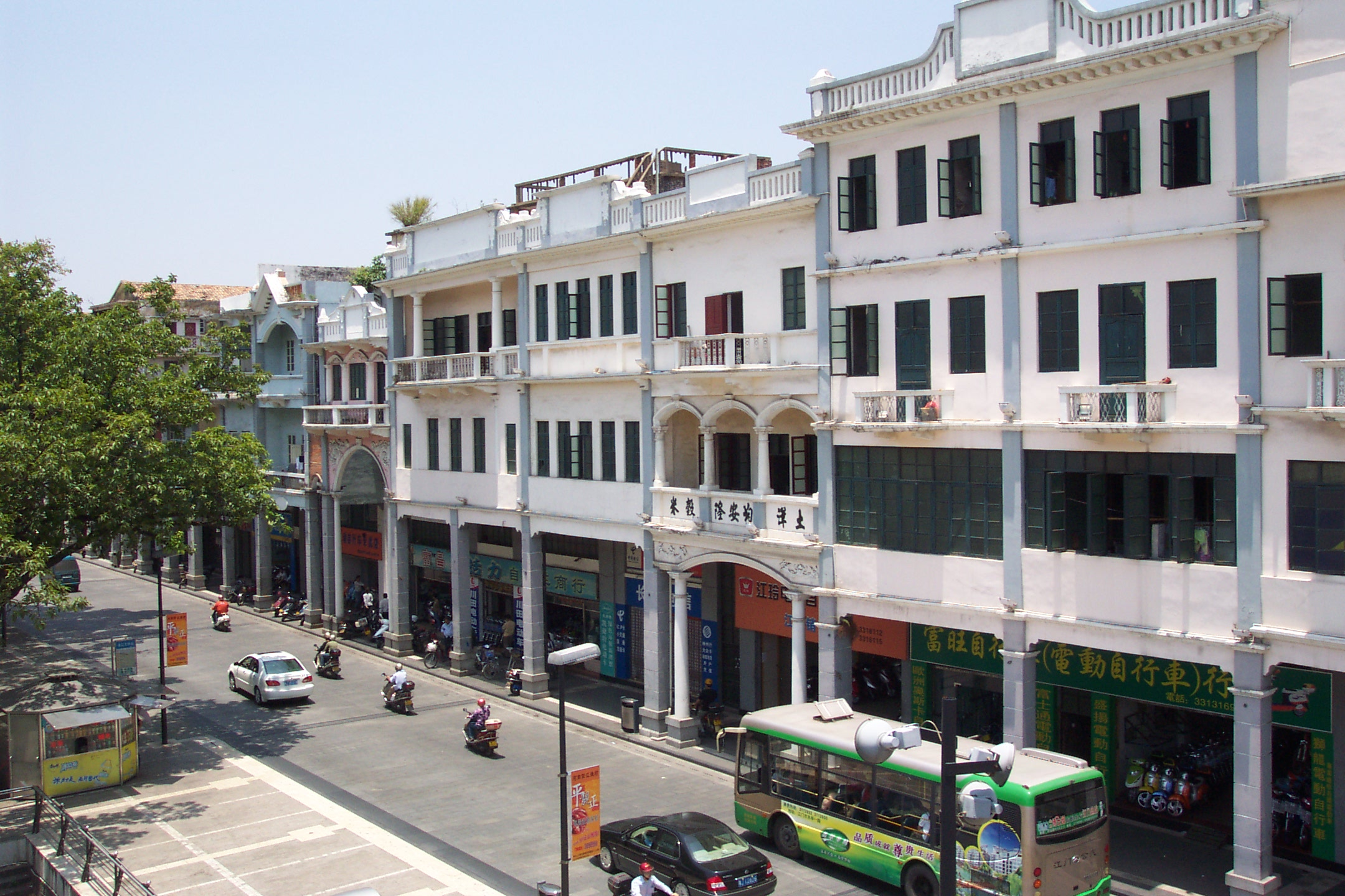 江门市长堤路骑楼建筑群